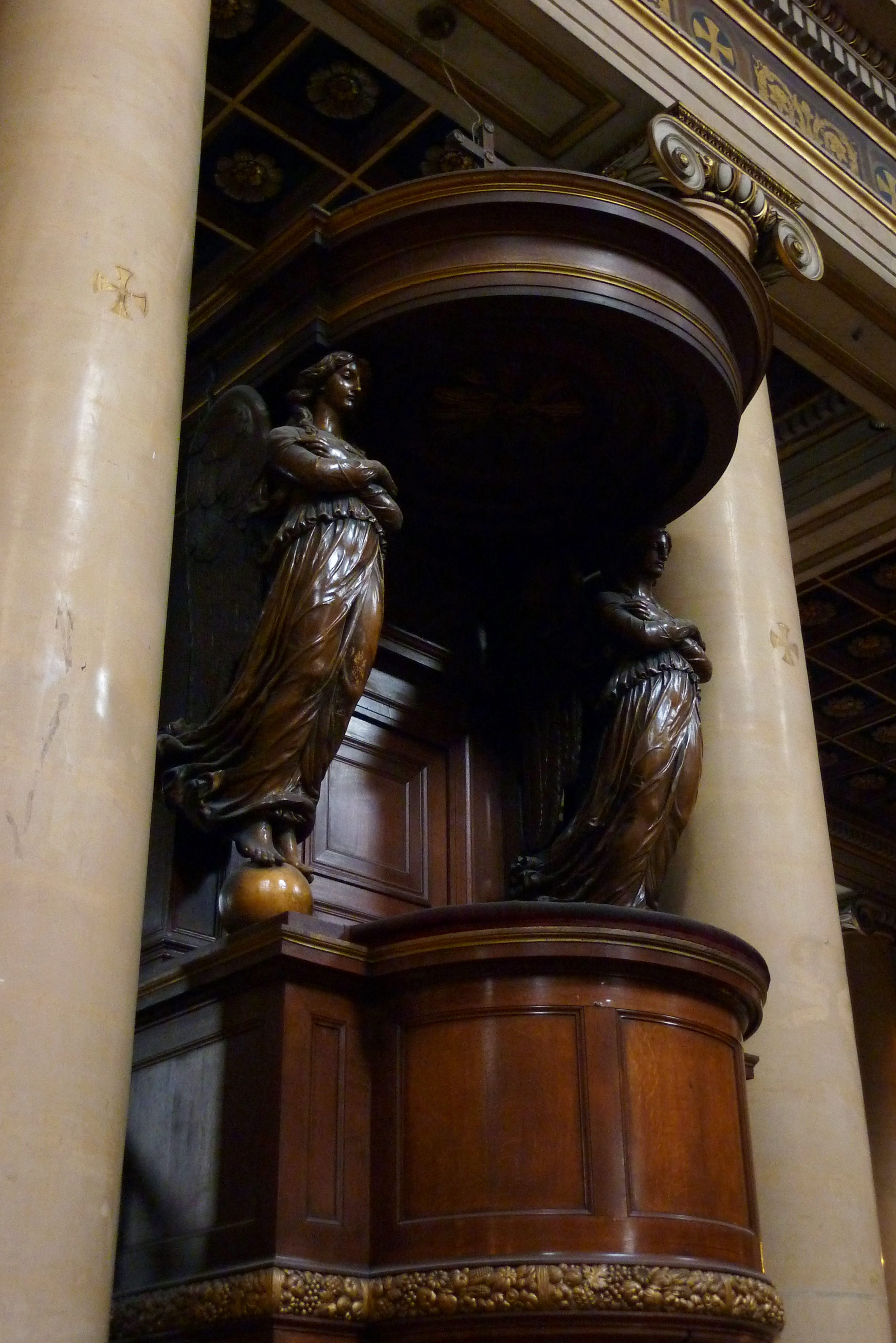 Kanzel in der katholischen Pfarrkirche Notre-Dame-de-Lorette in Paris